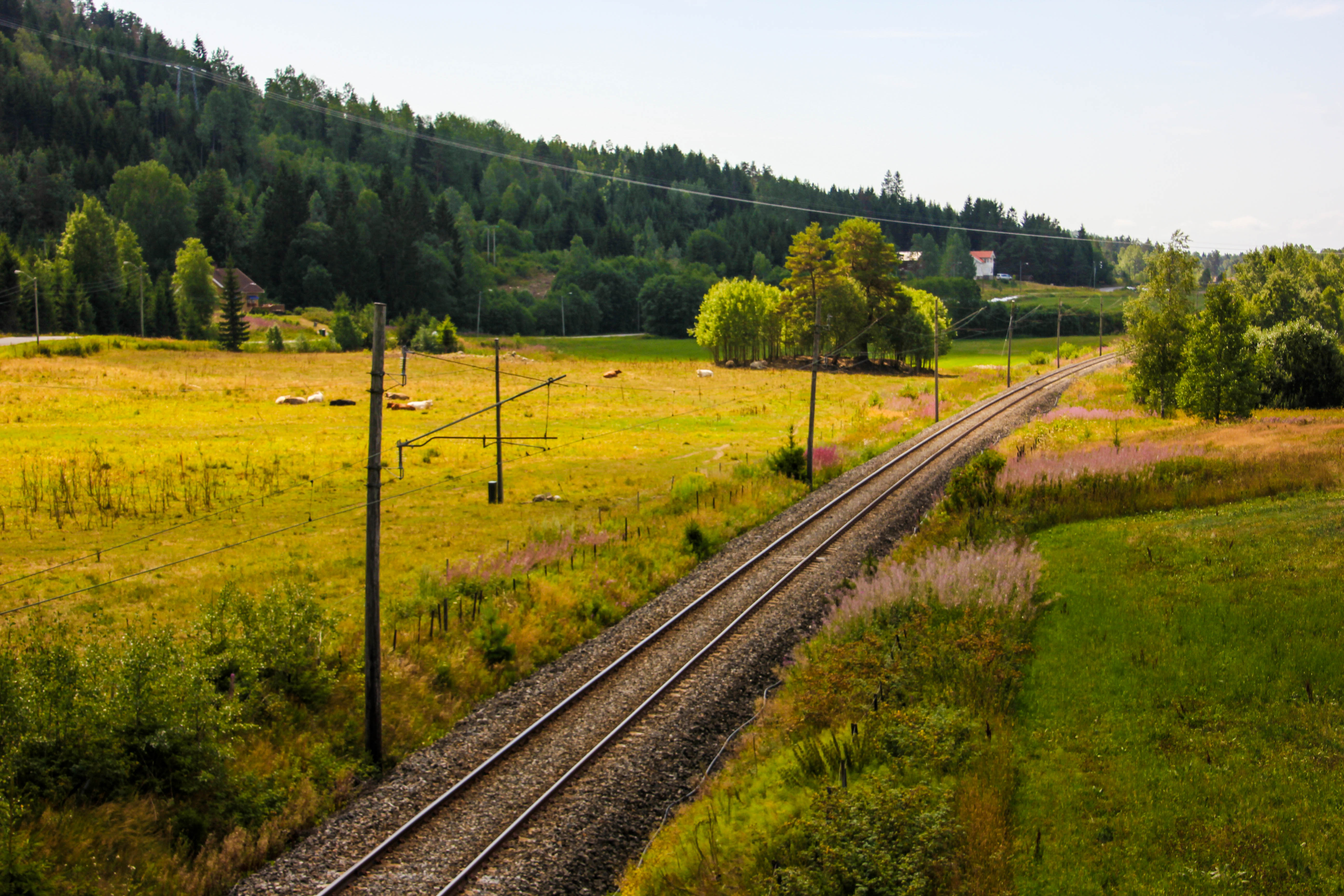 Jernbanestrekningen i mellom Bjørkedalen.